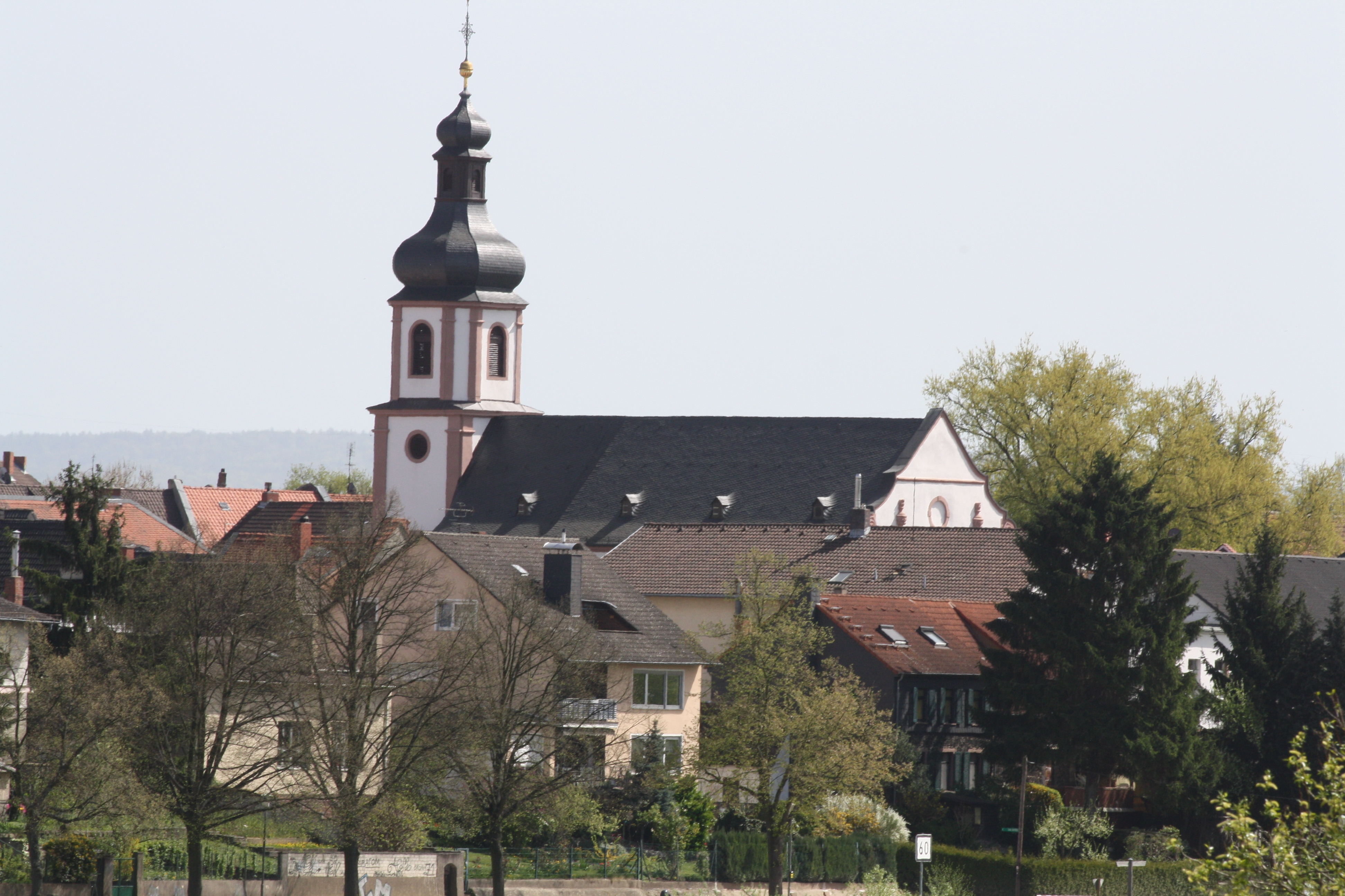 St. Jakob (Großauheim), von Nordwesten